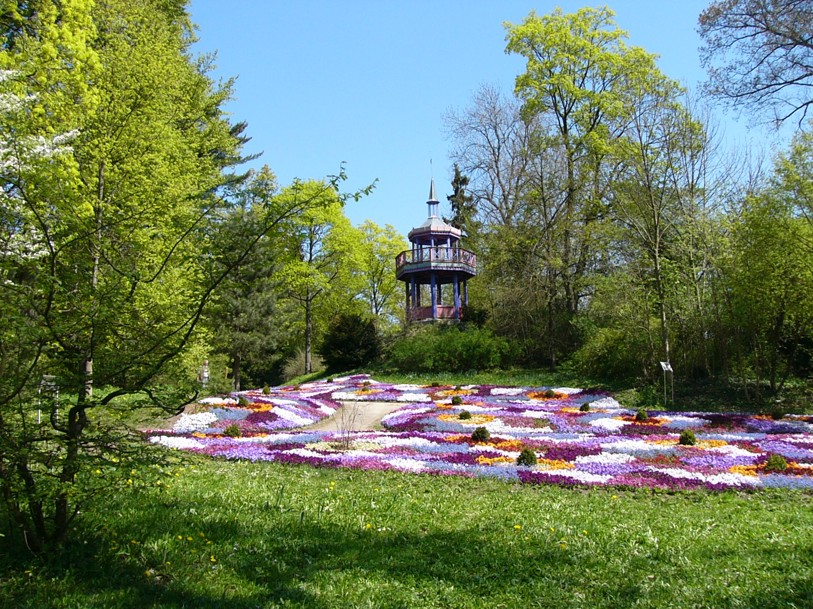 Bepflanzung im Park, Thomashöhe mit Pavillion